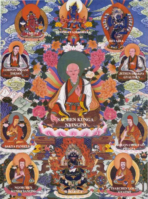 Sakya Gründungsväter Urheberrechte Mit freundlicher Genehmigung der Betreiber des Pauenhofs [1] und der Sakya-Heritage-Foundation. (GNU-FDL frei)